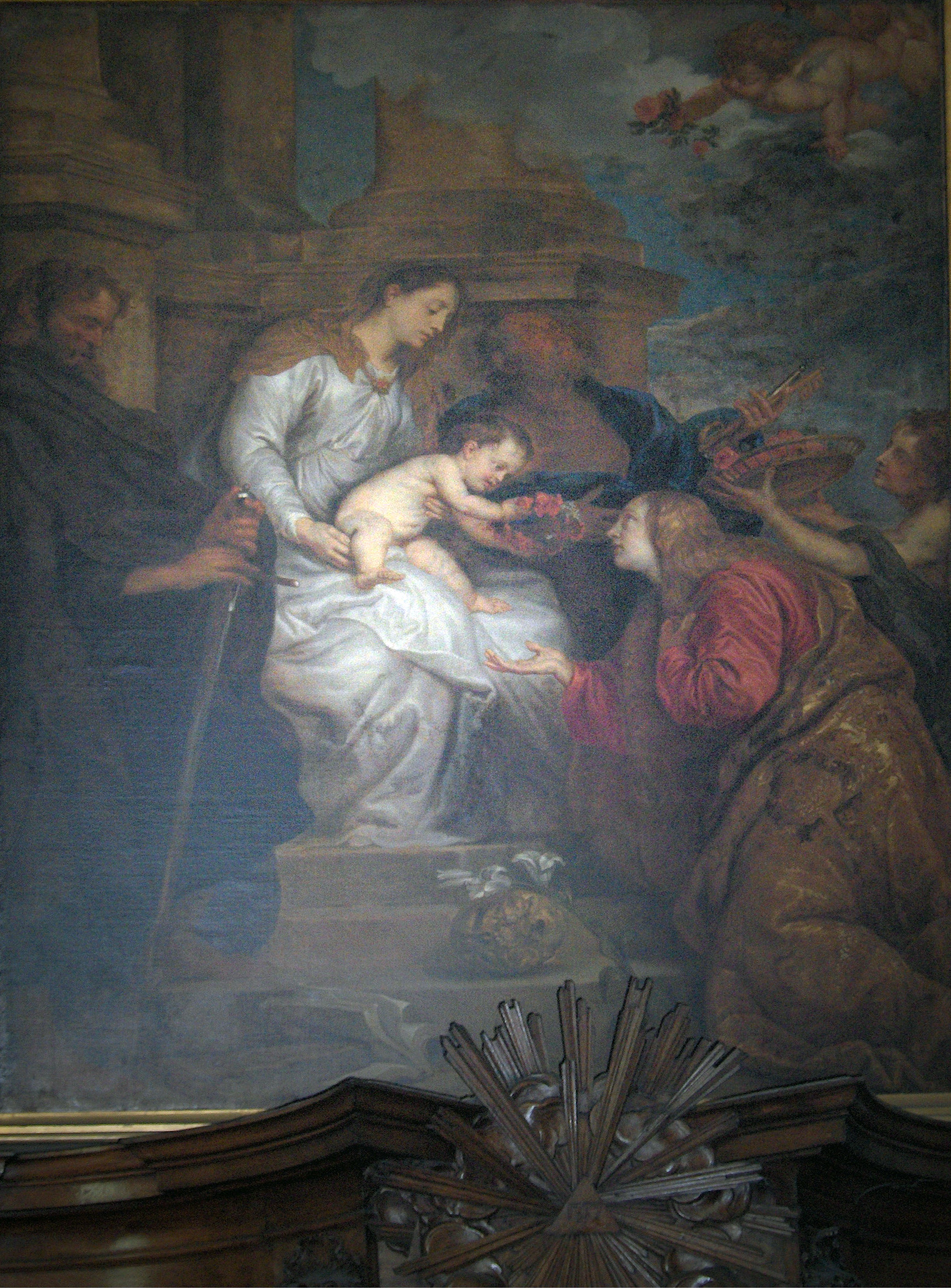 painting